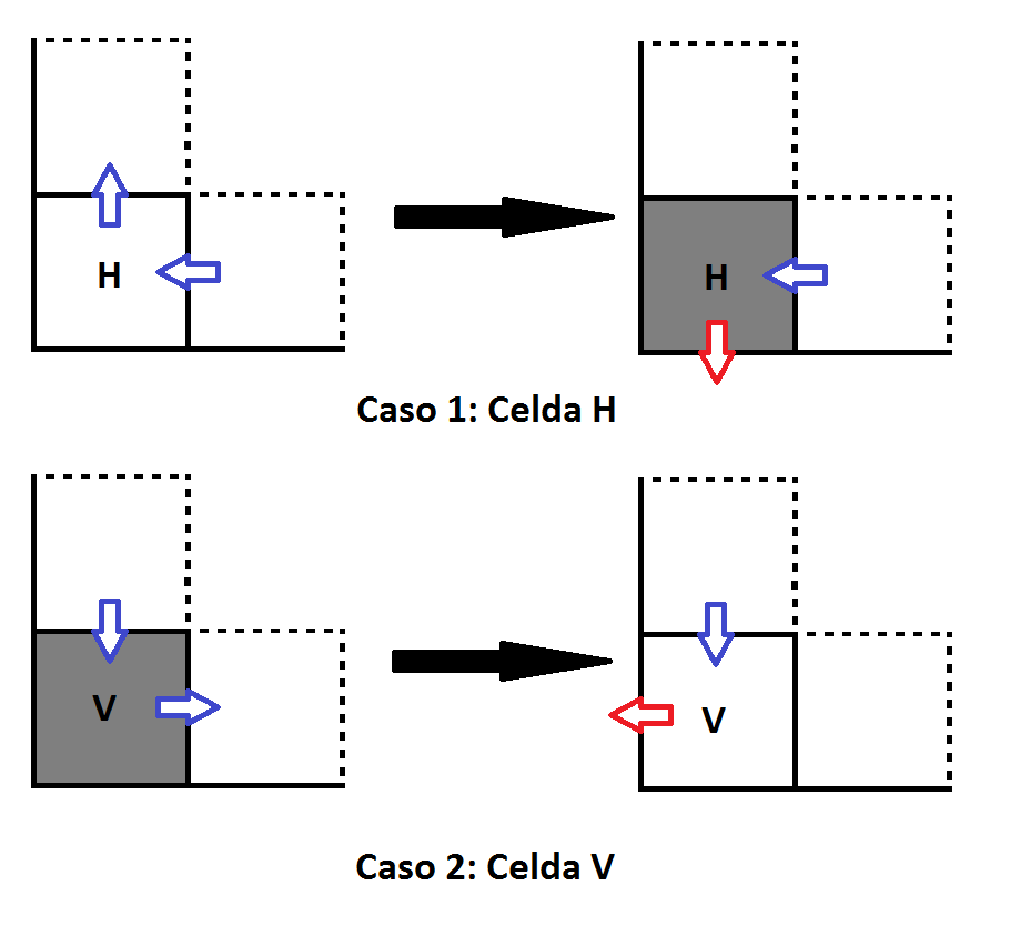 Explicación gráfica de la demostración del Teorema de Cohen-Kung